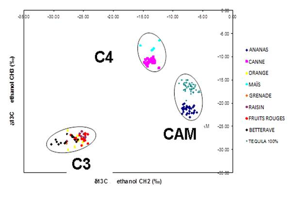 La méthode 13C-SNIF-NMR®, une récente méthode de routine